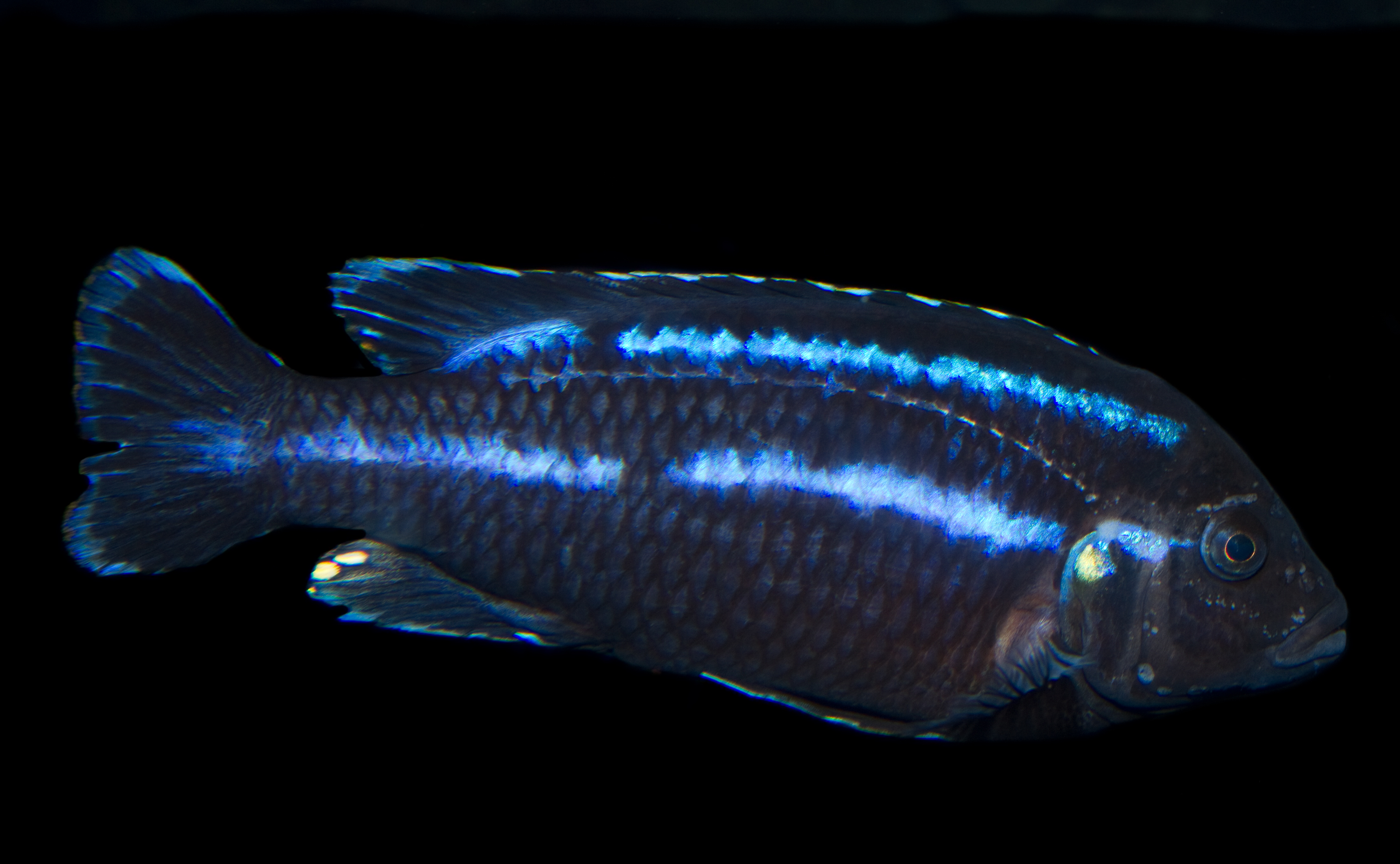 Parallel Striped Mbuna (Male) Melanochromis parallelus